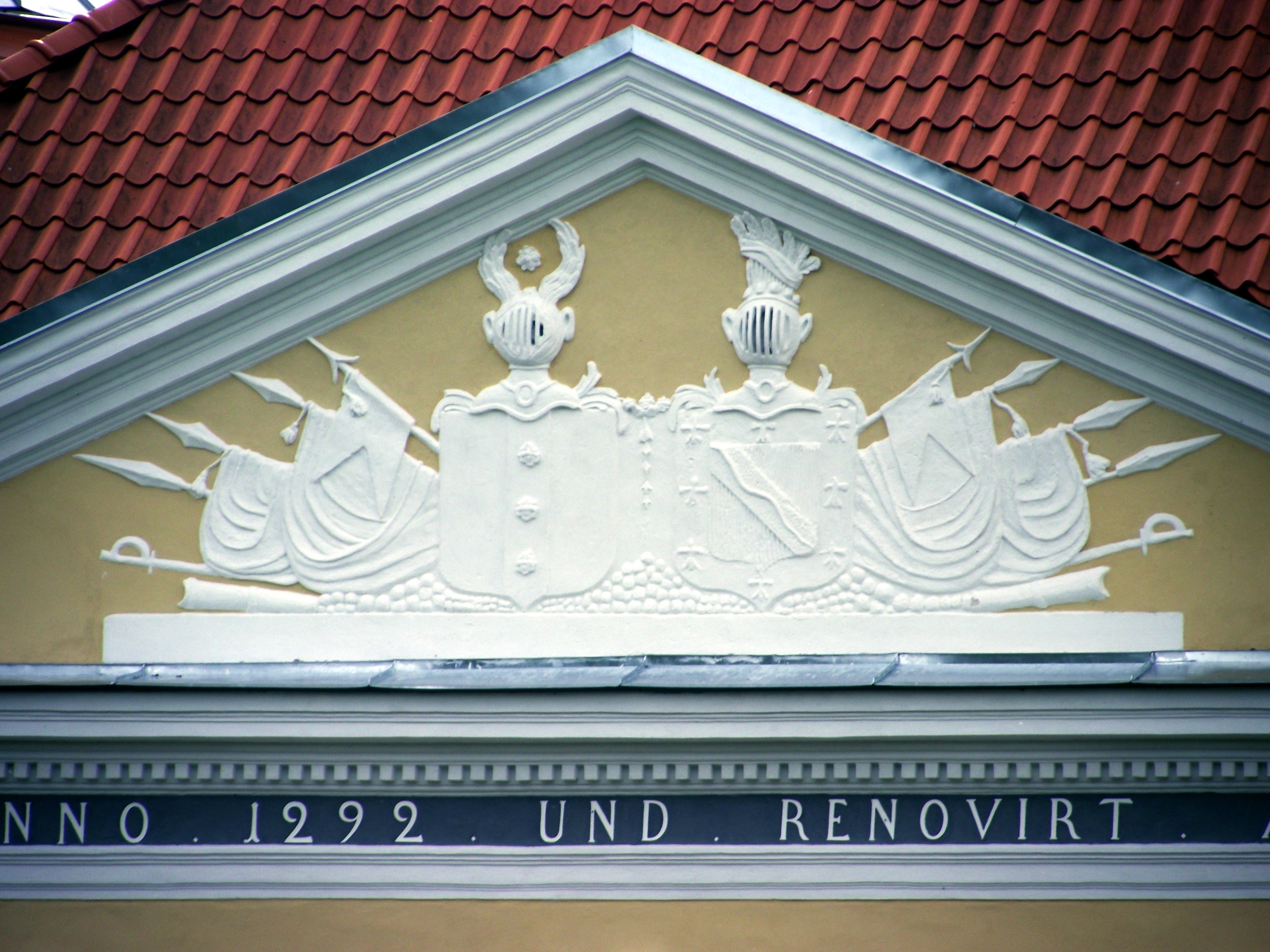 Kiltsi mõisa peahoone frontoon Benckendorffide ja Brevernide vapiga.